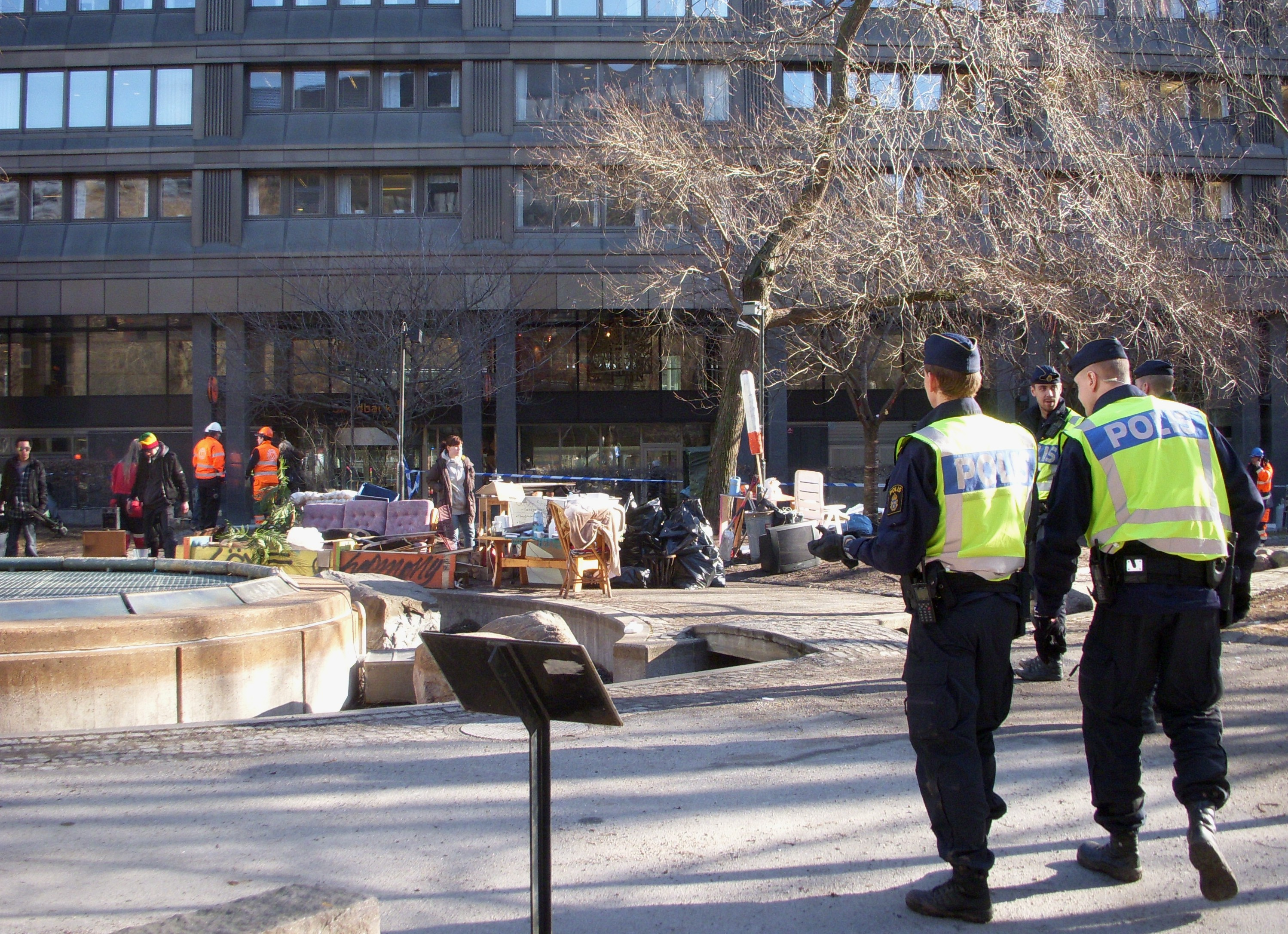 Occupy-rörelsens tältläger på Brunkebergstorg i Stockholm rivs av polisen